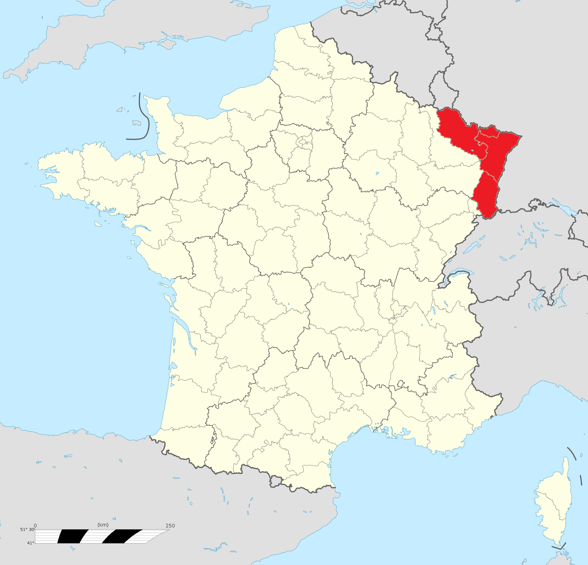 Carte de l'Alsace-Moselle au sein des départements et régions de France.